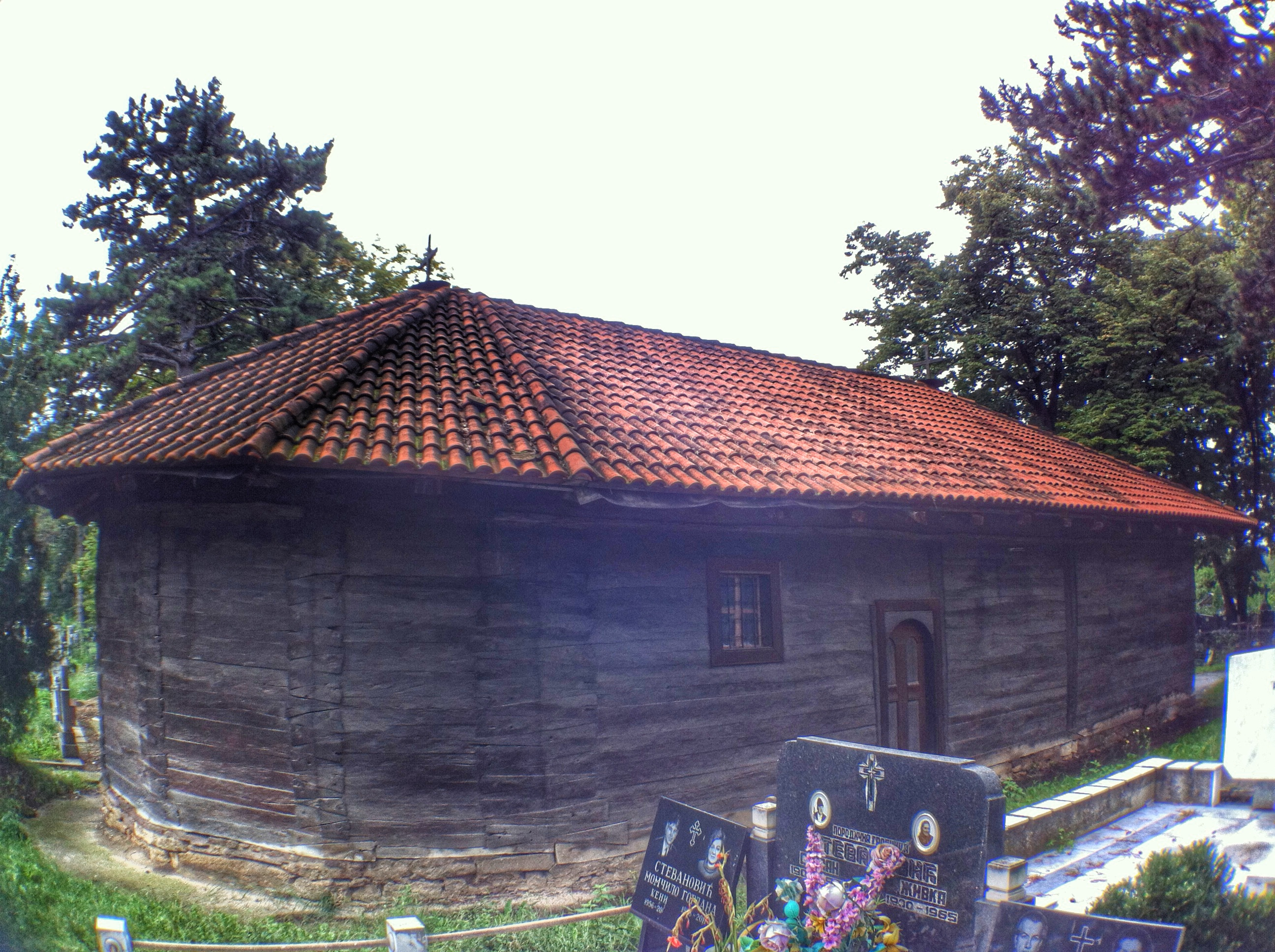 Српски (ћирилица): Црква се налази на паланачком гробљу међу лепо уређеним стазама и природом. Подигнута је крајем треће деценије 19.века. Првобитно се налазила усред насеља али је 1906.године премештена на гробље где се и данас налази.